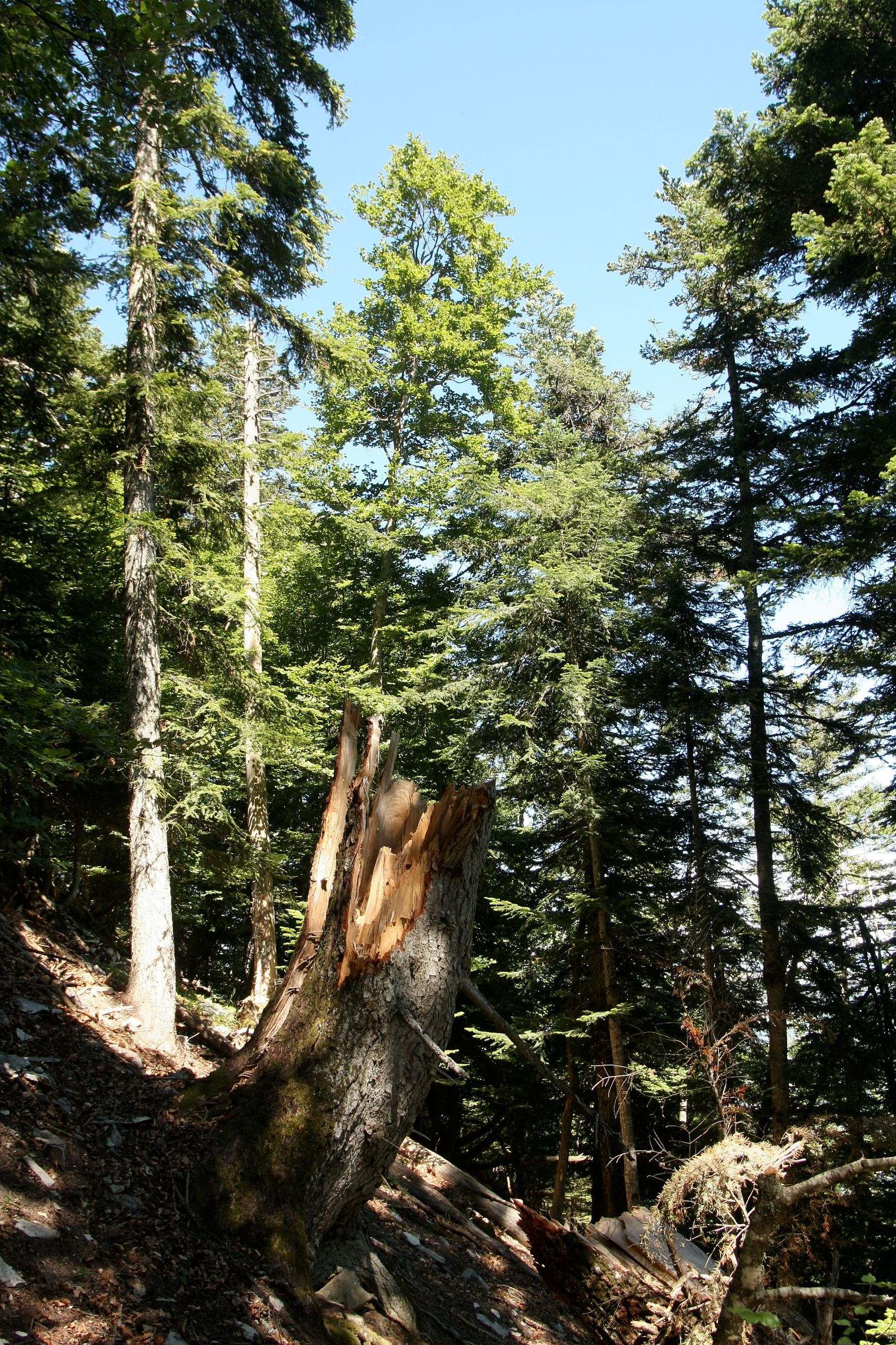 Chandelle de résineux dans la forêt du Lude (04)